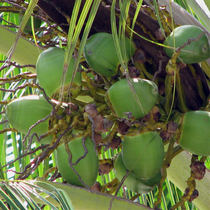 Coconut Palm Florida Keys